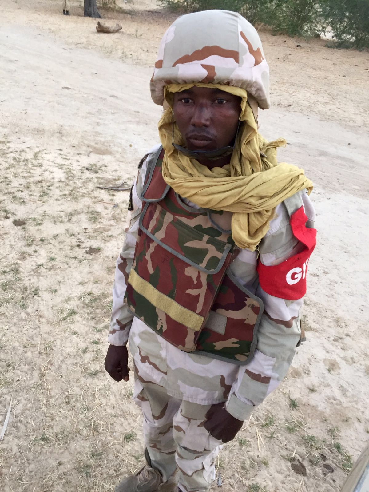 Un soldat nigérien monte la garde près de Diffa, le 29 février 2016. Notre envoyé spécial au Niger, Nicolas Pinault, s'est rendu près de la frontière avec le Nigeria où l'armée patrouille pour sécuriser la zone contre les terroristes de Boko Haram. Regardez ses images.